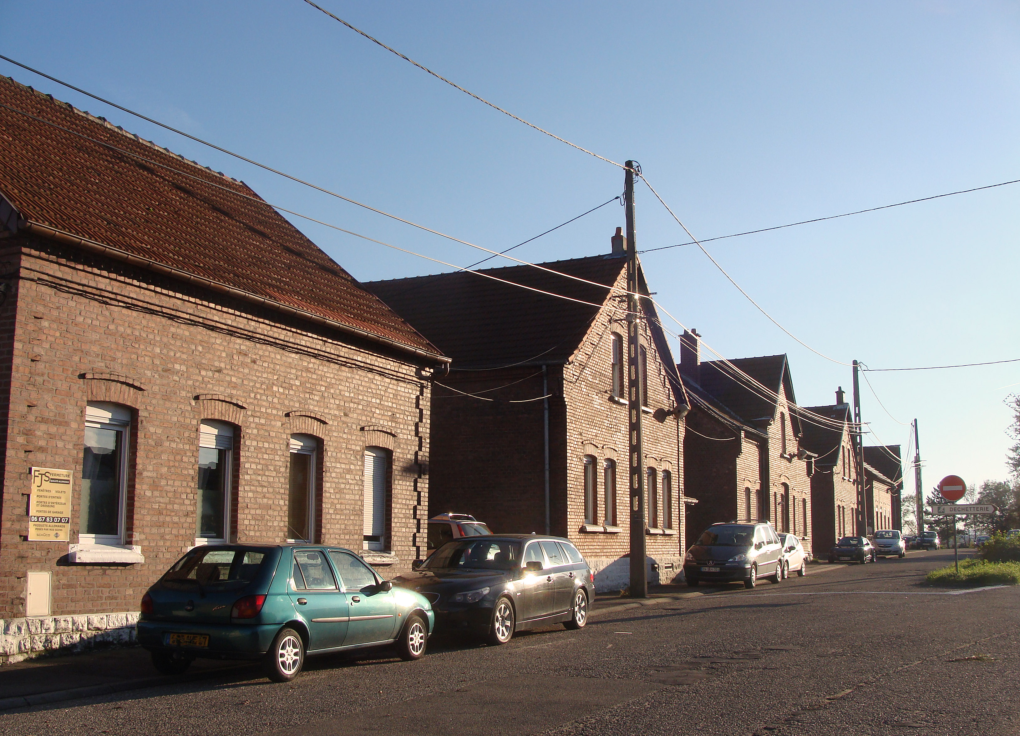 Cité du Puits 3, L'Hôpital (Moselle)